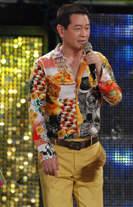 蔡小虎出席三立電視綜藝節目《超級夜總會》錄影。